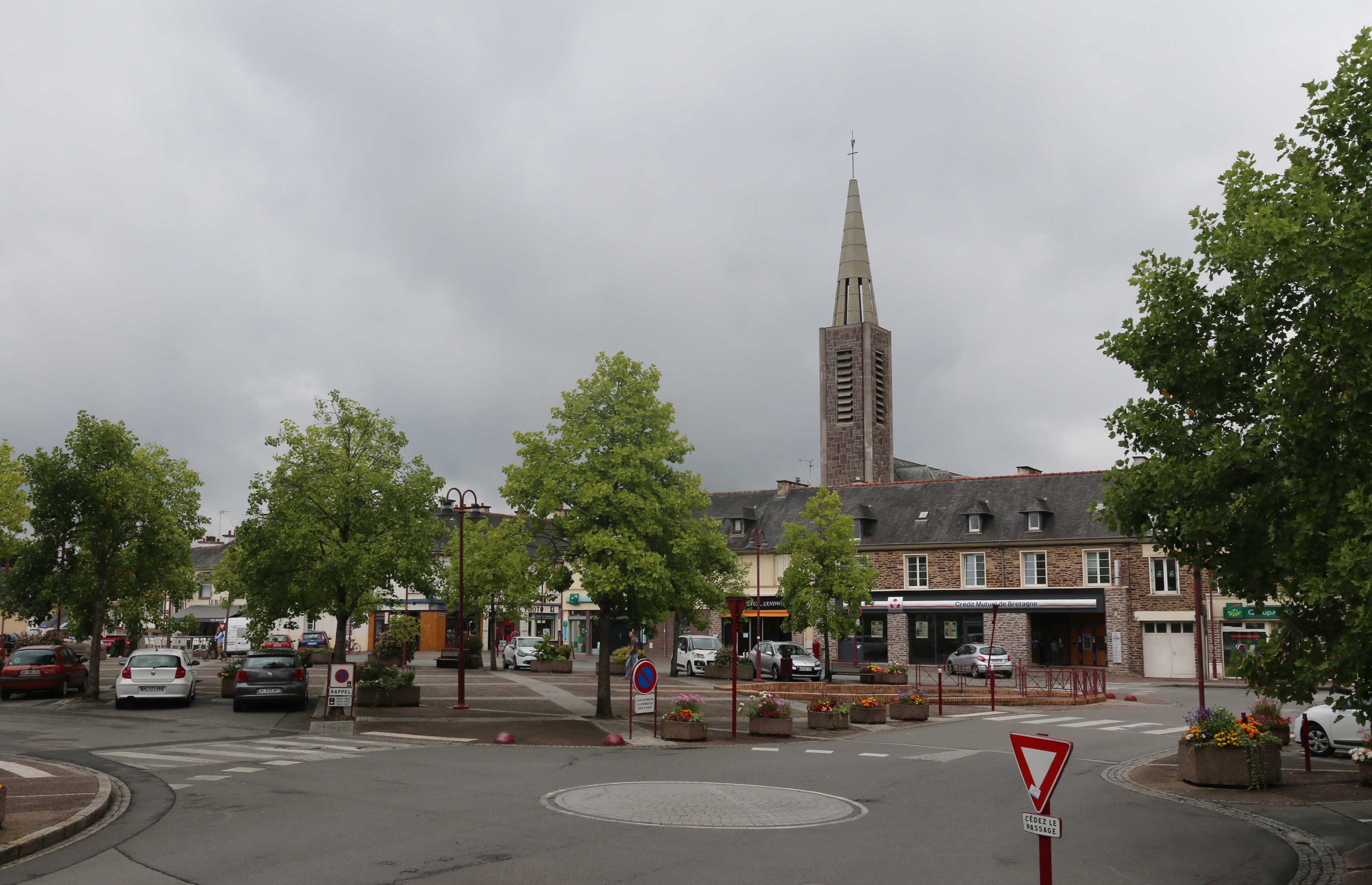 La place principale de Bruz